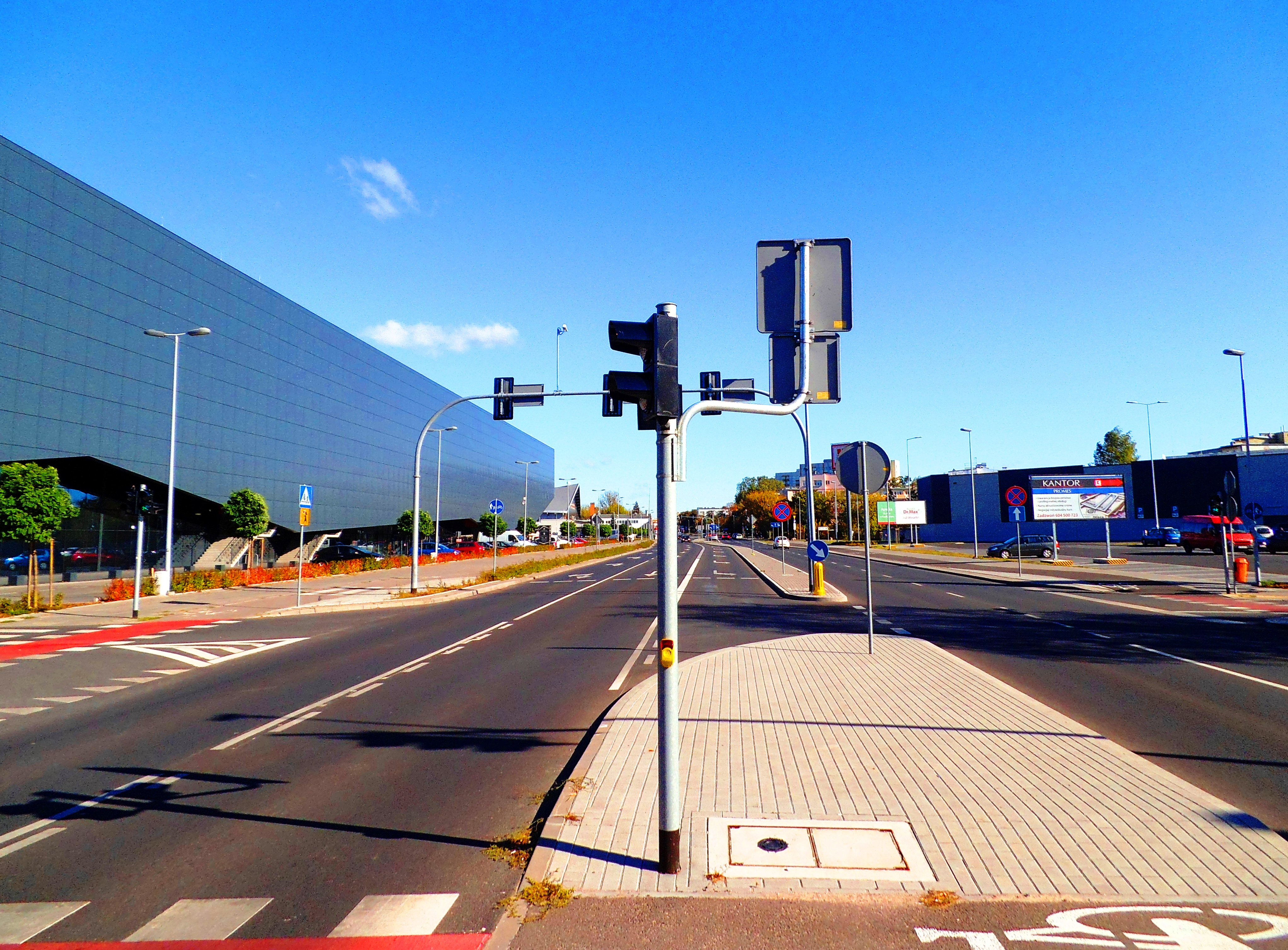 Ulica Bema w Toruniu